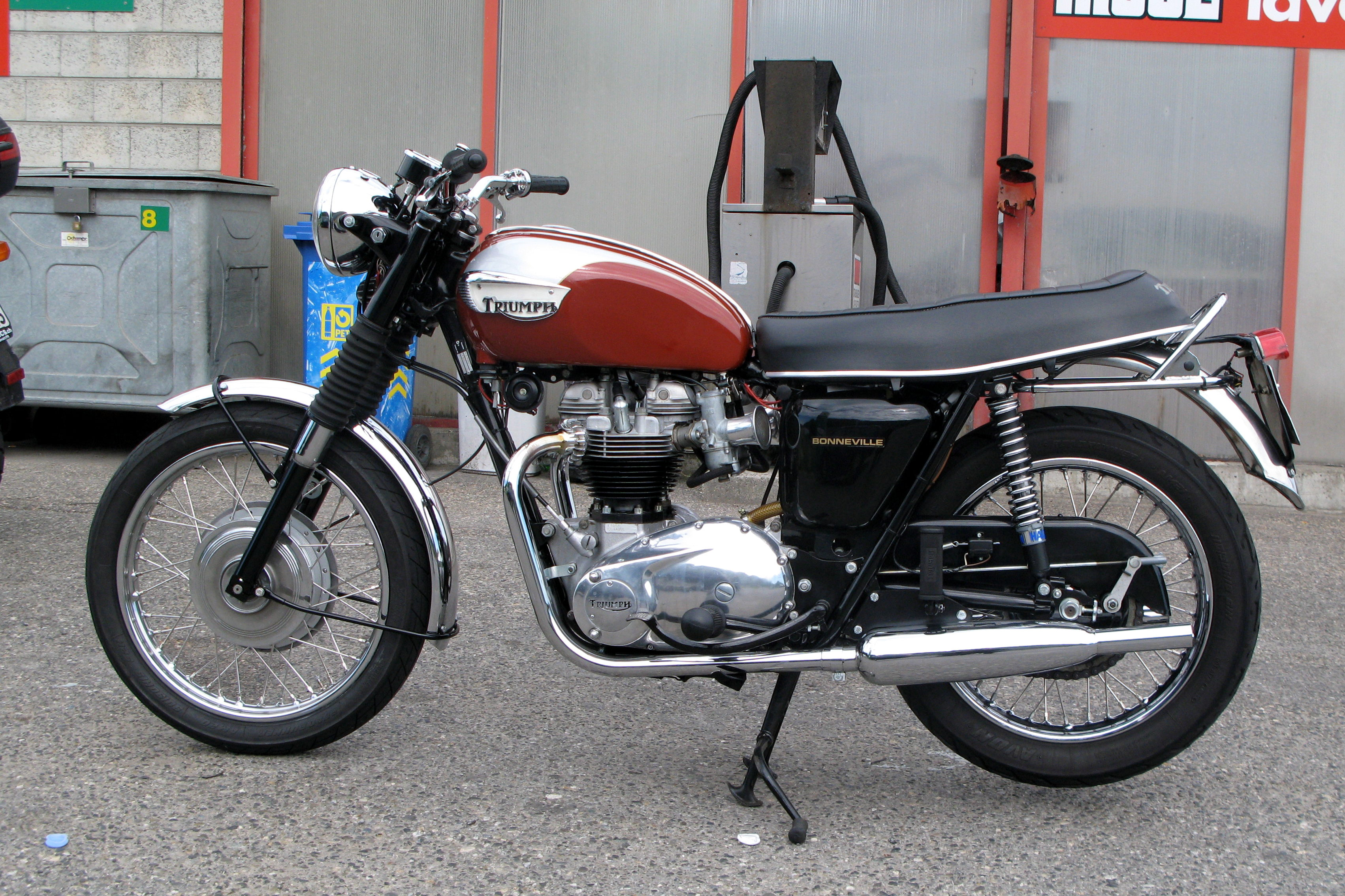 Vintage Triumph Bonneville